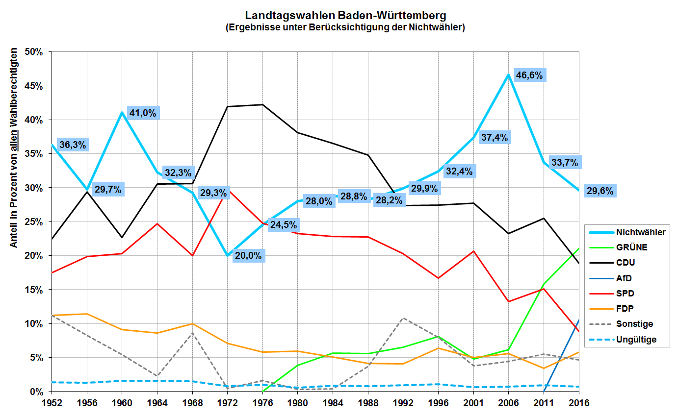 Historie des Anteils der Nichtwähler bei den Landtagswahlen in Baden-Württemberg